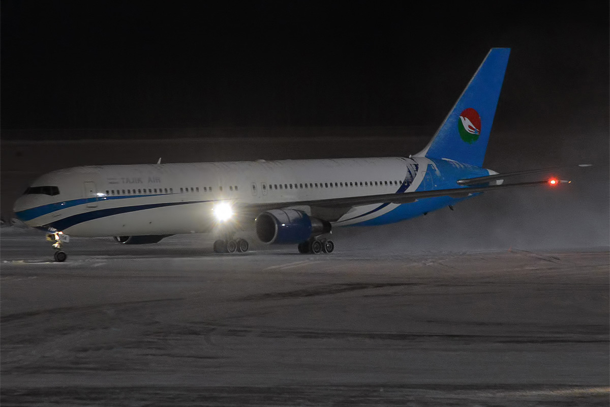 Tajik Air, EY-756, Boeing 767-332